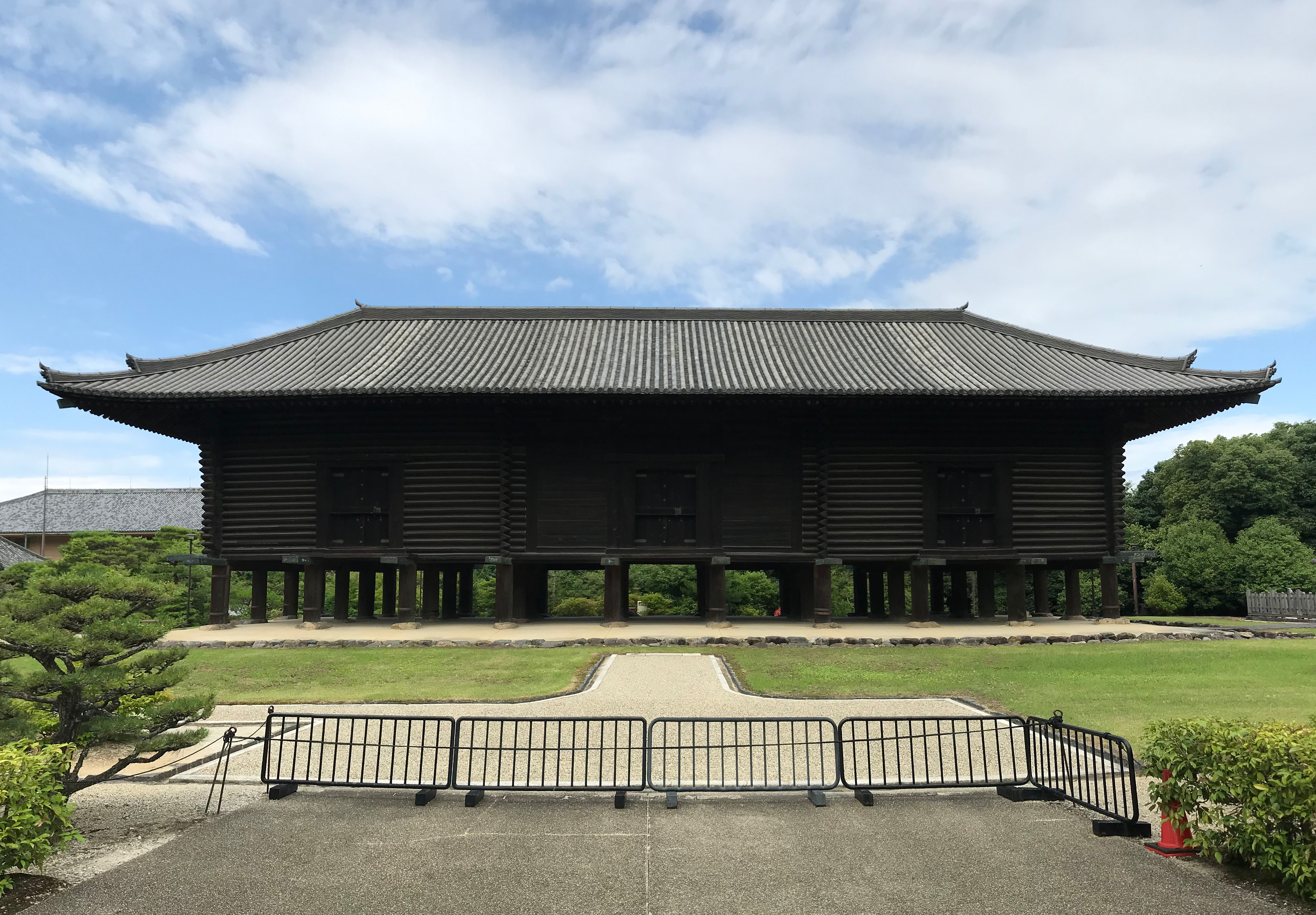 正倉院外構公開